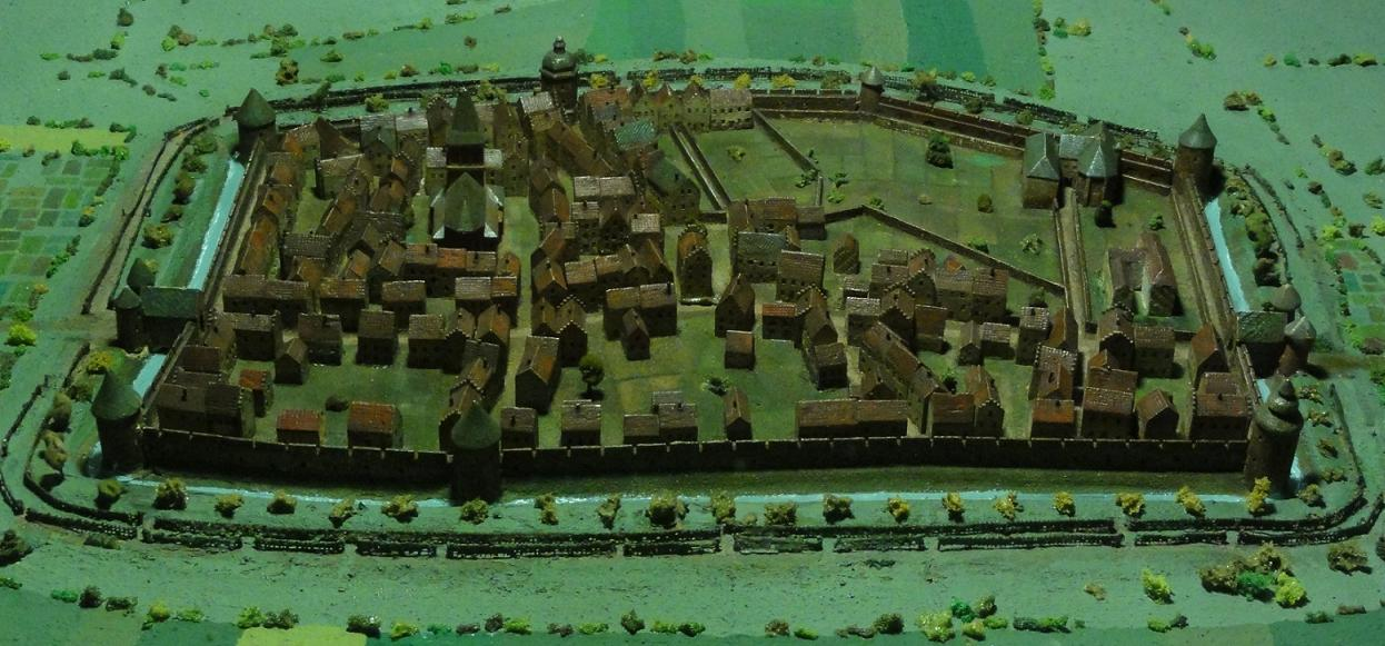 Stadtmodell Krefeld 16. Jh. - aus der Modellabteilung Museum Linn